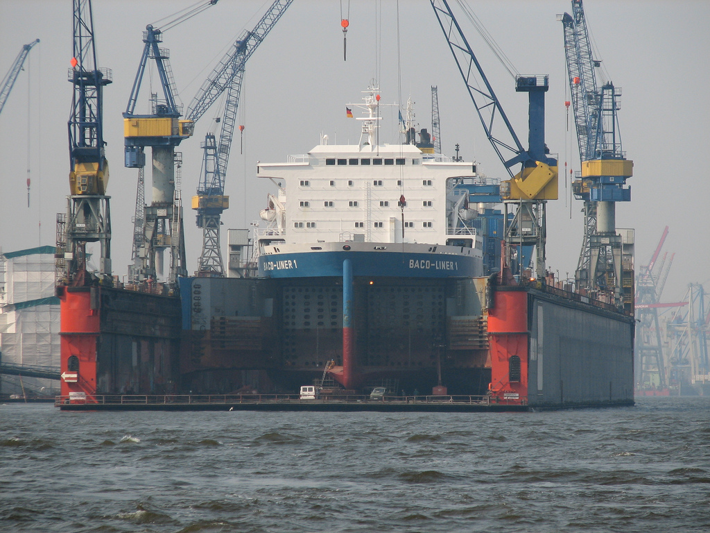 Blohm + Voss Dock 10 im Hamburger Hafen. März 2007